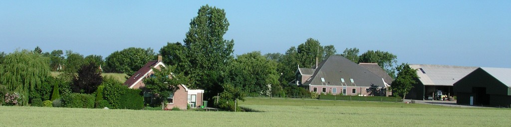 Het buitengebied van het buurtschap Kreil. countryside of the Hamlet Kreil.